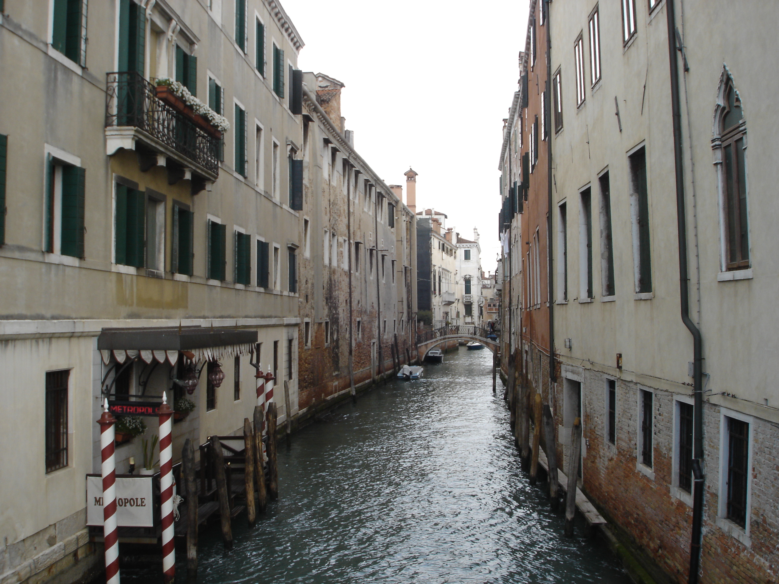 Venecia (Italia)